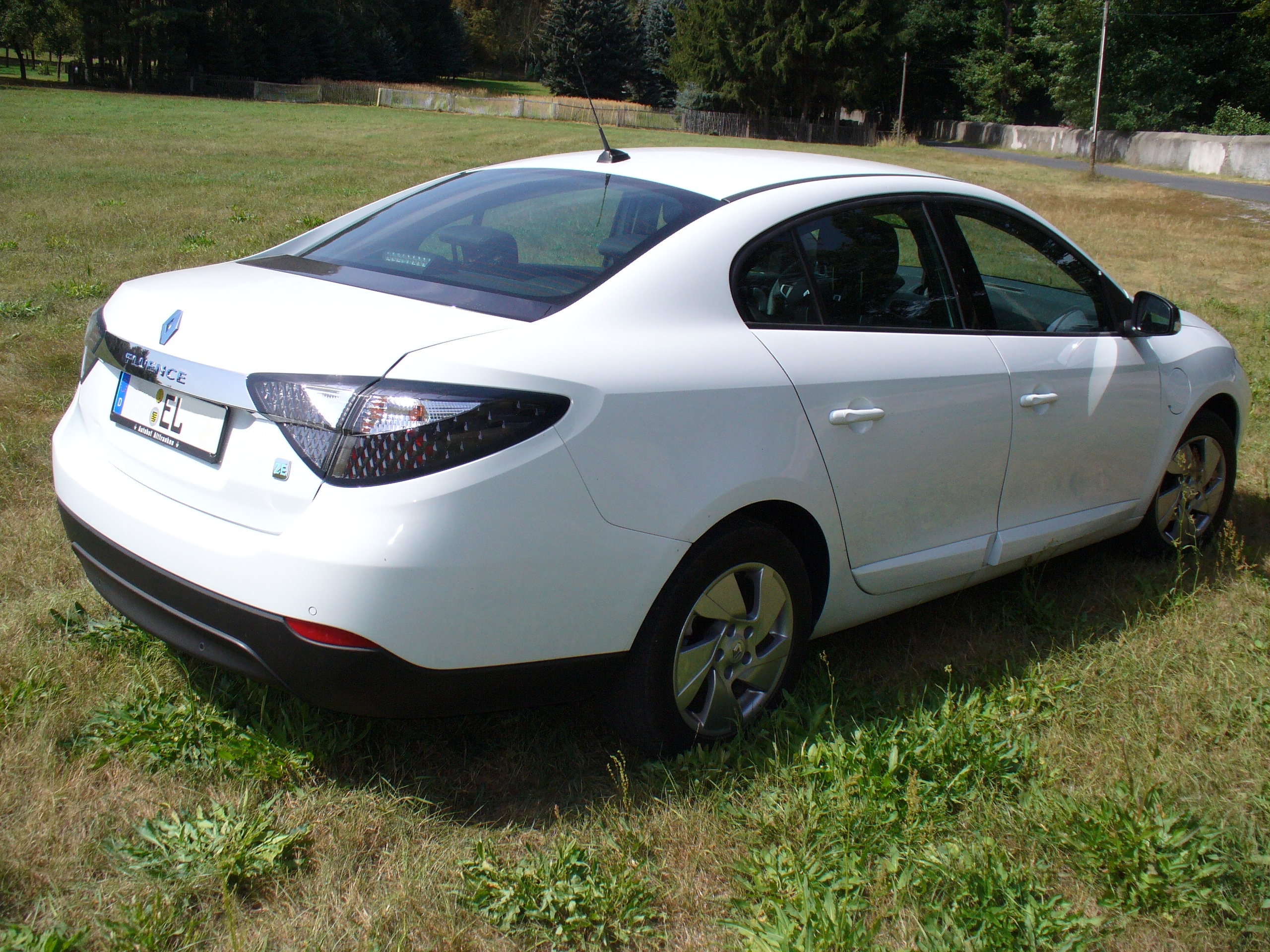 Renault Fluenze Z.E., Ansicht rechts-hinten